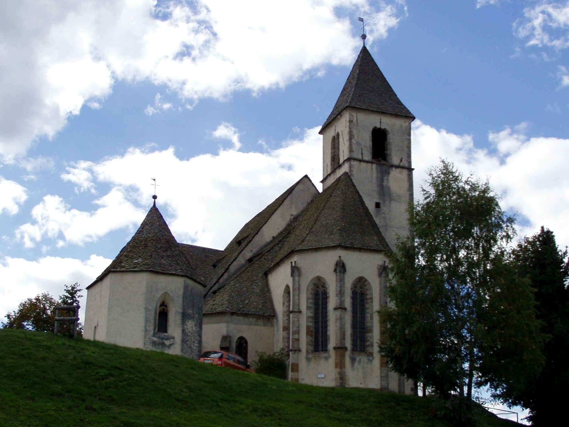 Kirche Magdalensberg, Carinthia